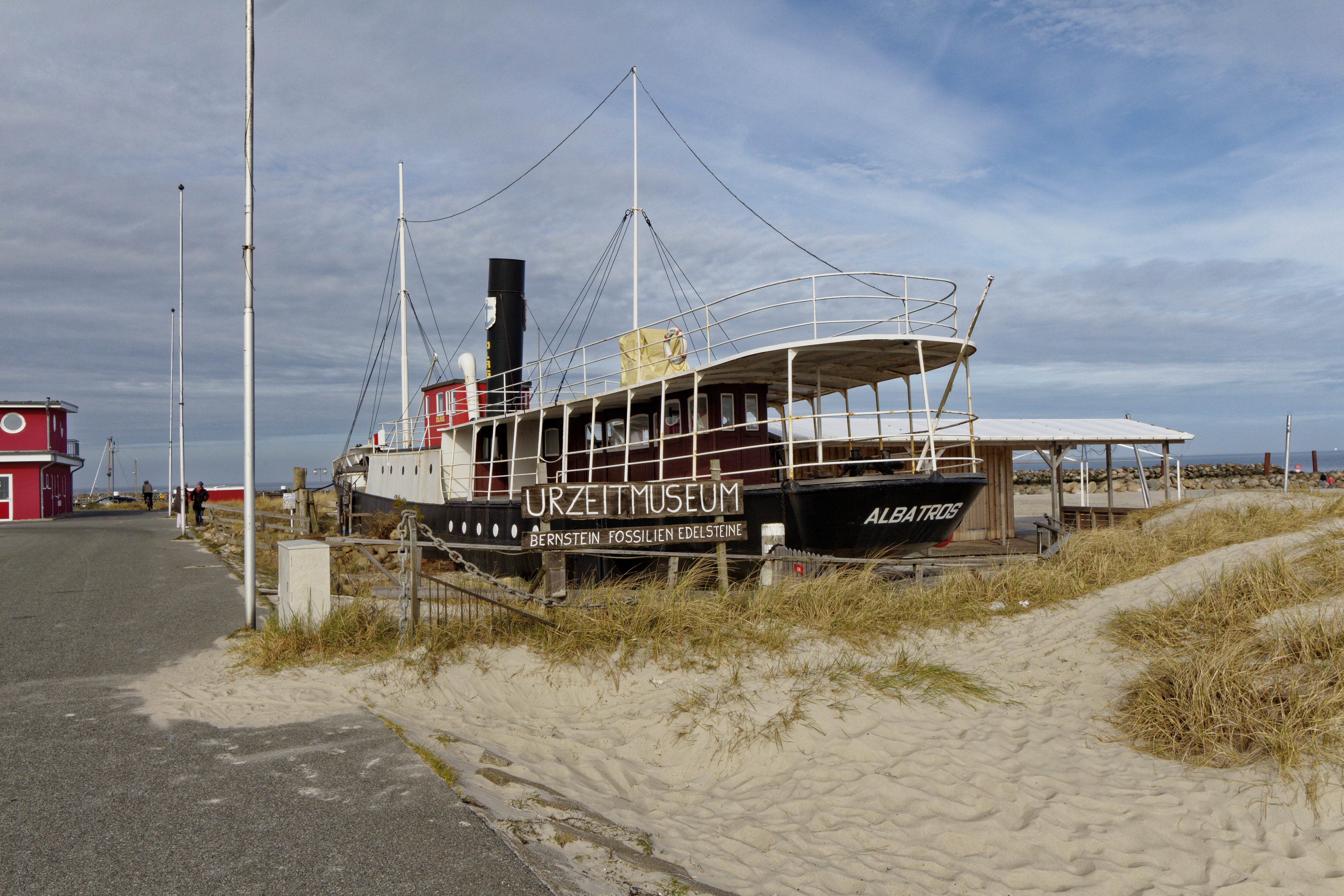 Damp; Dampfschiff Albatros; Urzeitmuseum